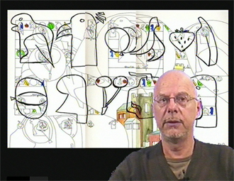 Portrait de Gérard-Philippe Broutin